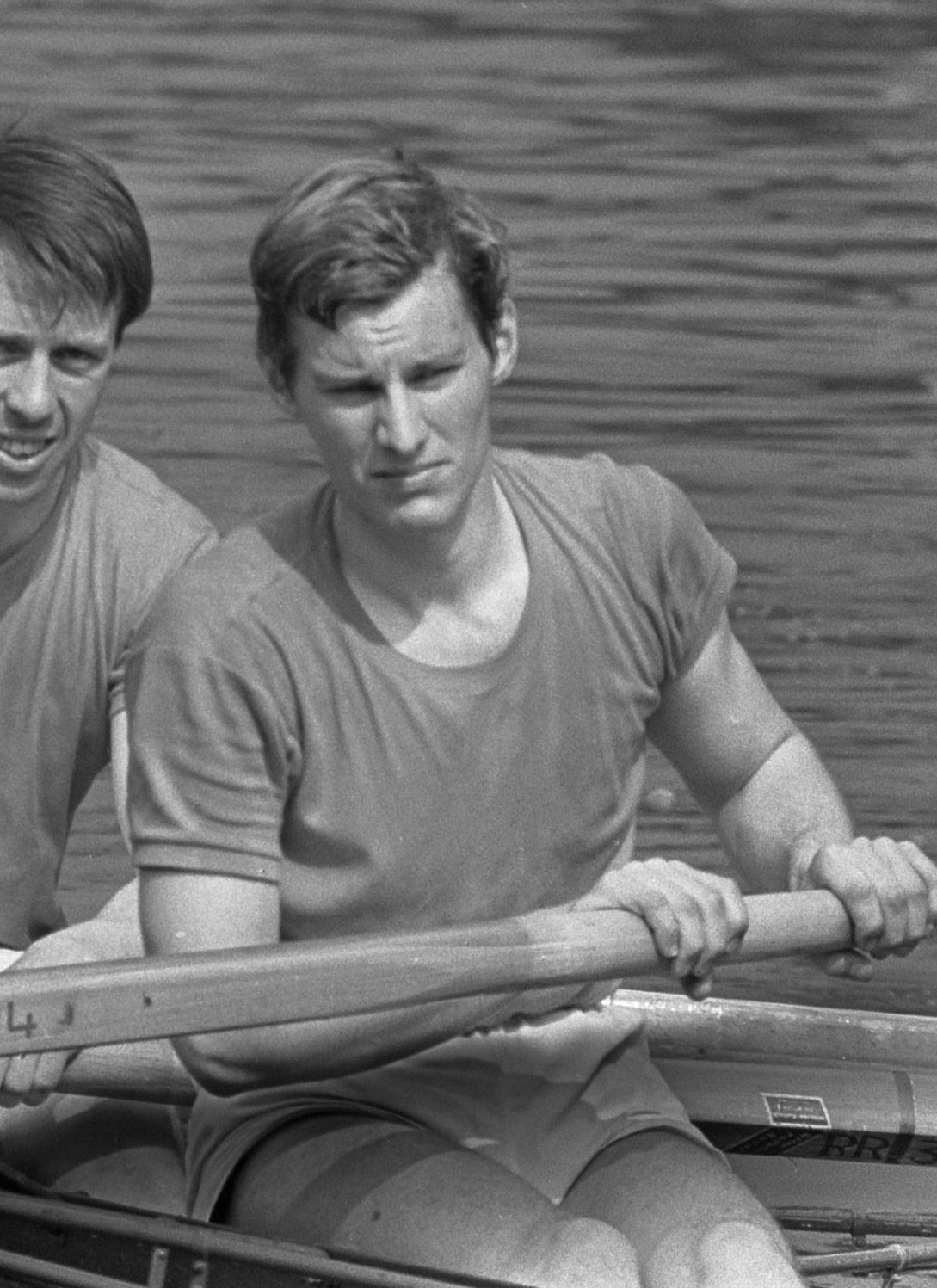 Roeien Bosbaan. Vier zonder Triton, Rouwe